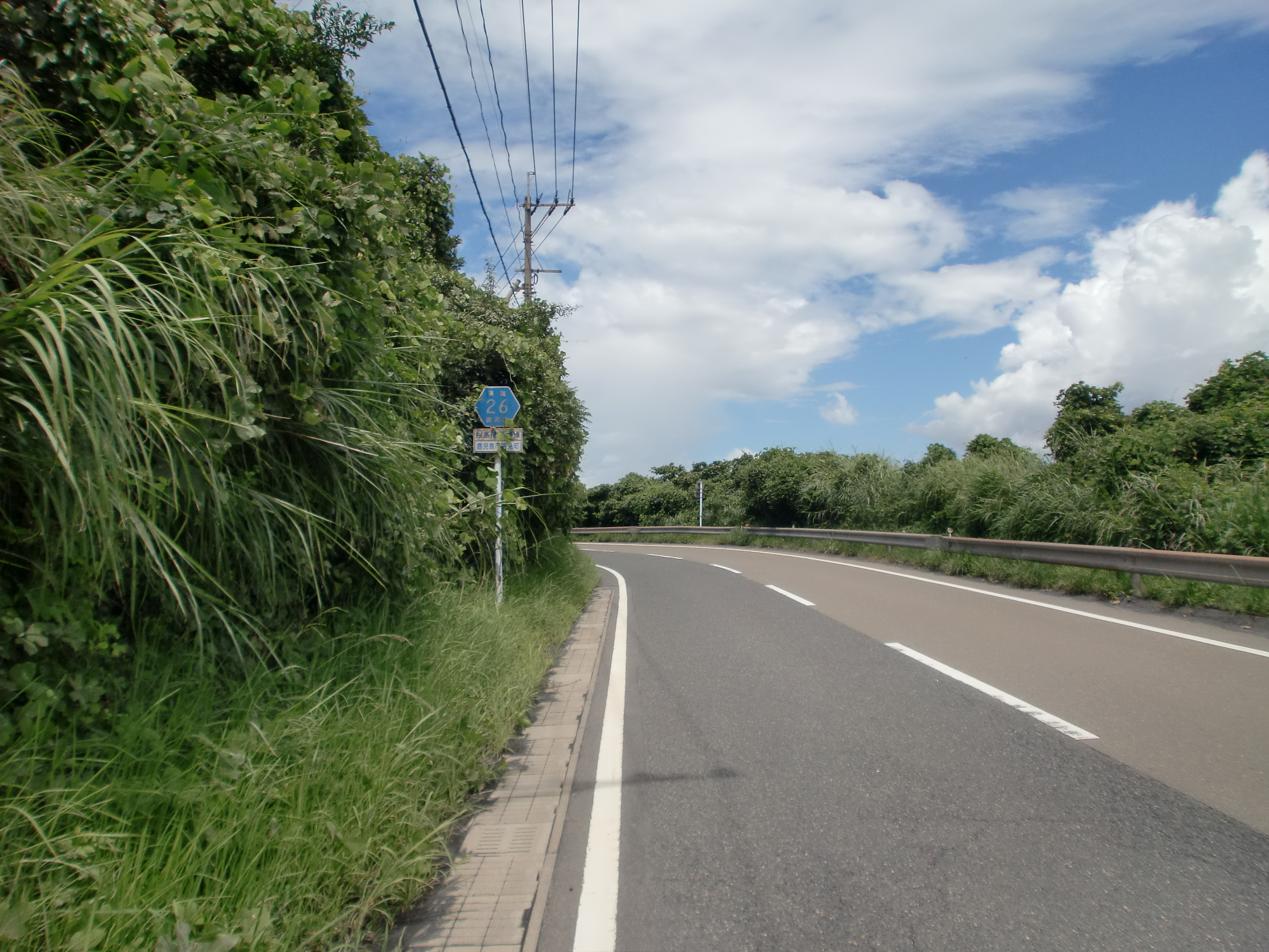 鹿児島県道26号桜島黒神線を高免町から桜島港方面を望む